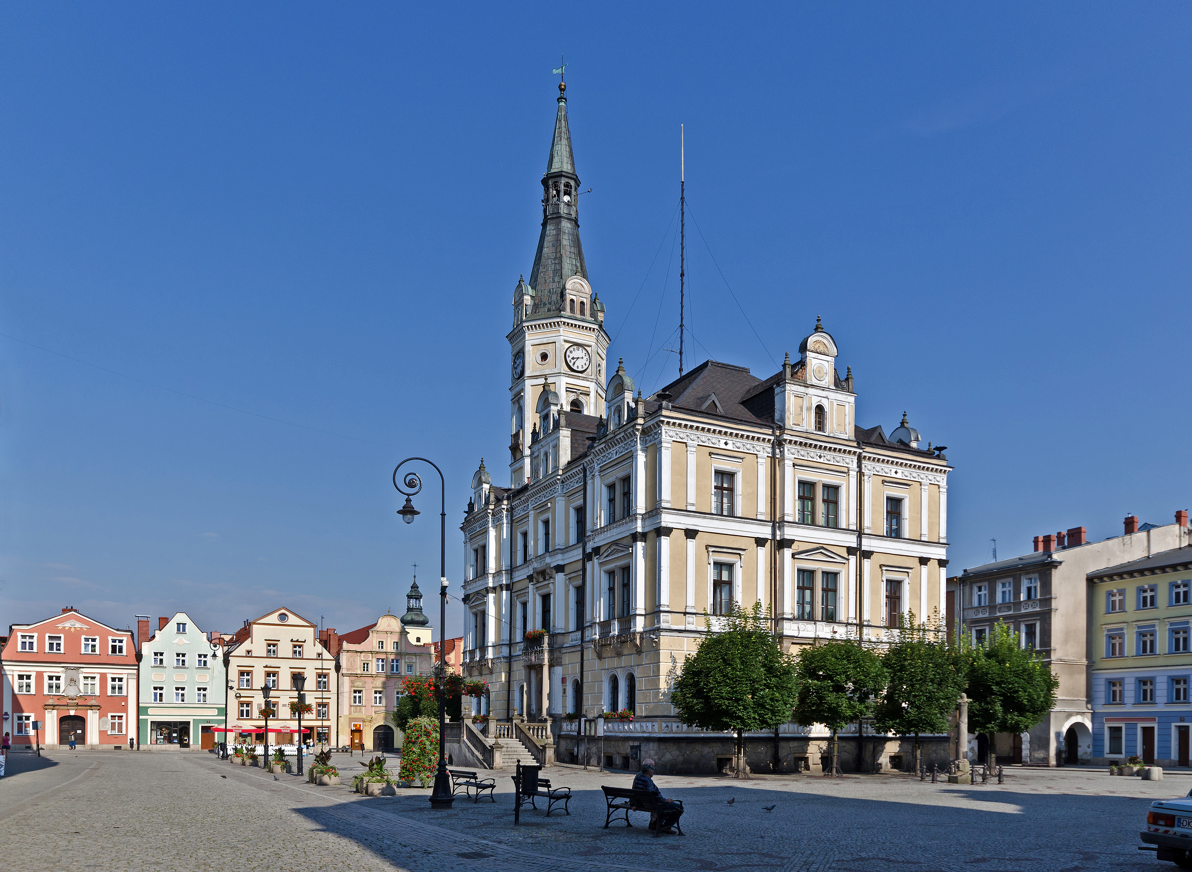 Lądek-Zdrój, ratusz, 1537, 1739, 1872